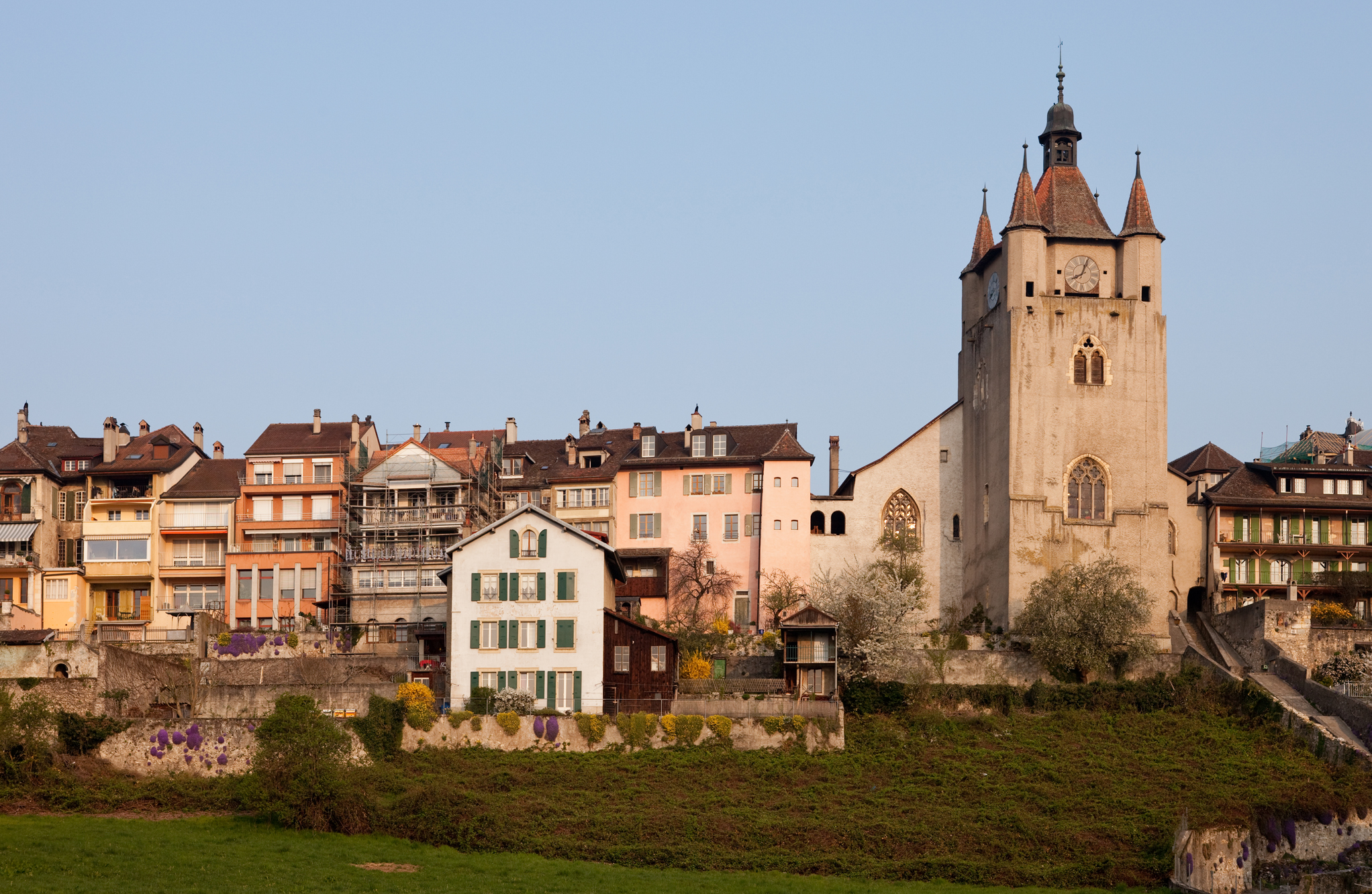 Reformierte Kirche Notre-Dame in Orbe